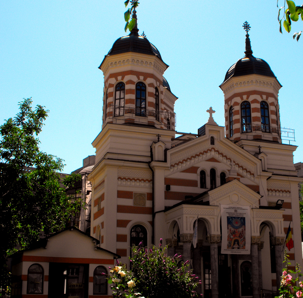 Biserica "Buna Vestire" - Dobroteasa